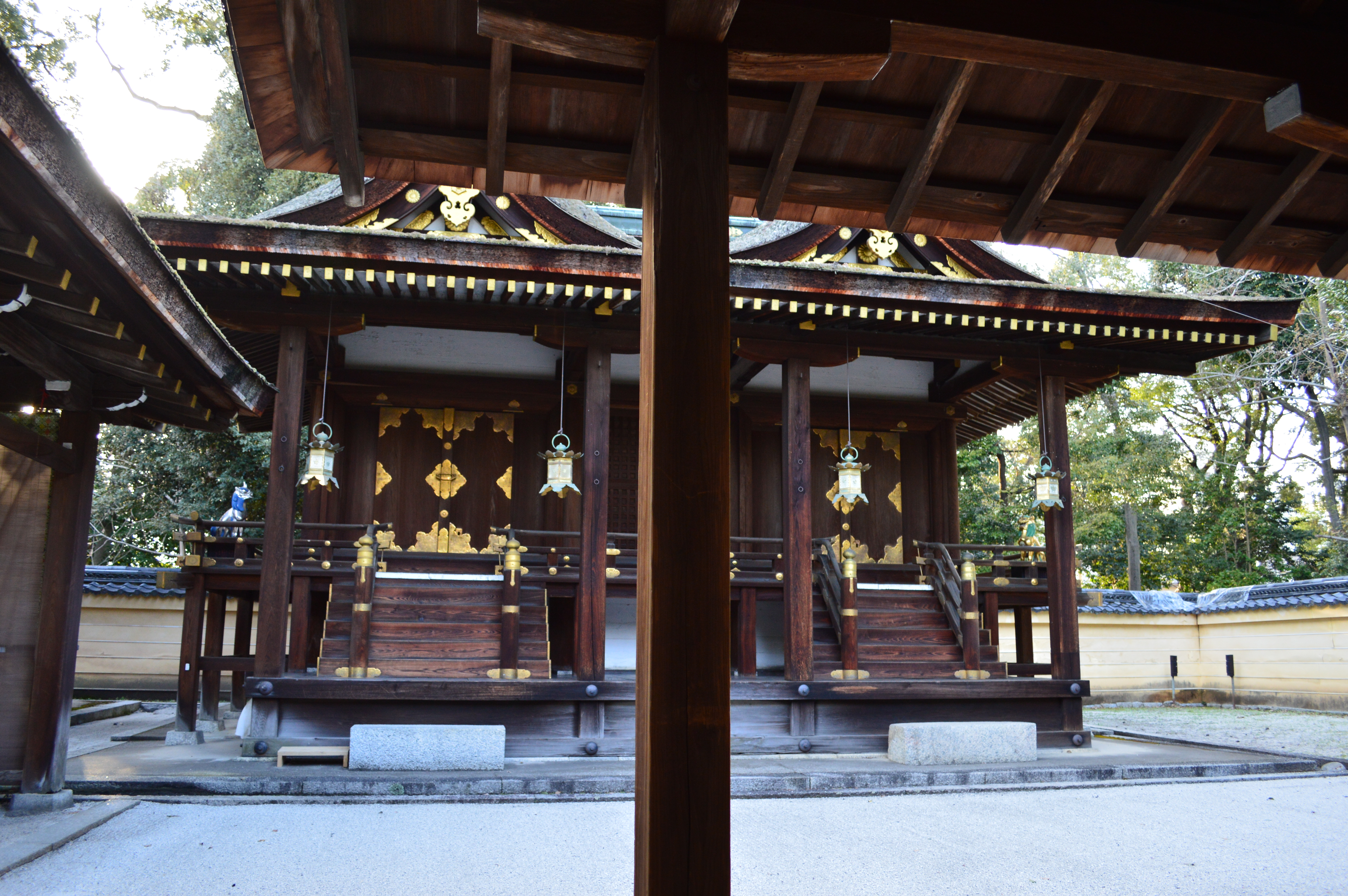 平野神社 (京都市) 本殿 (第一殿・第二殿)